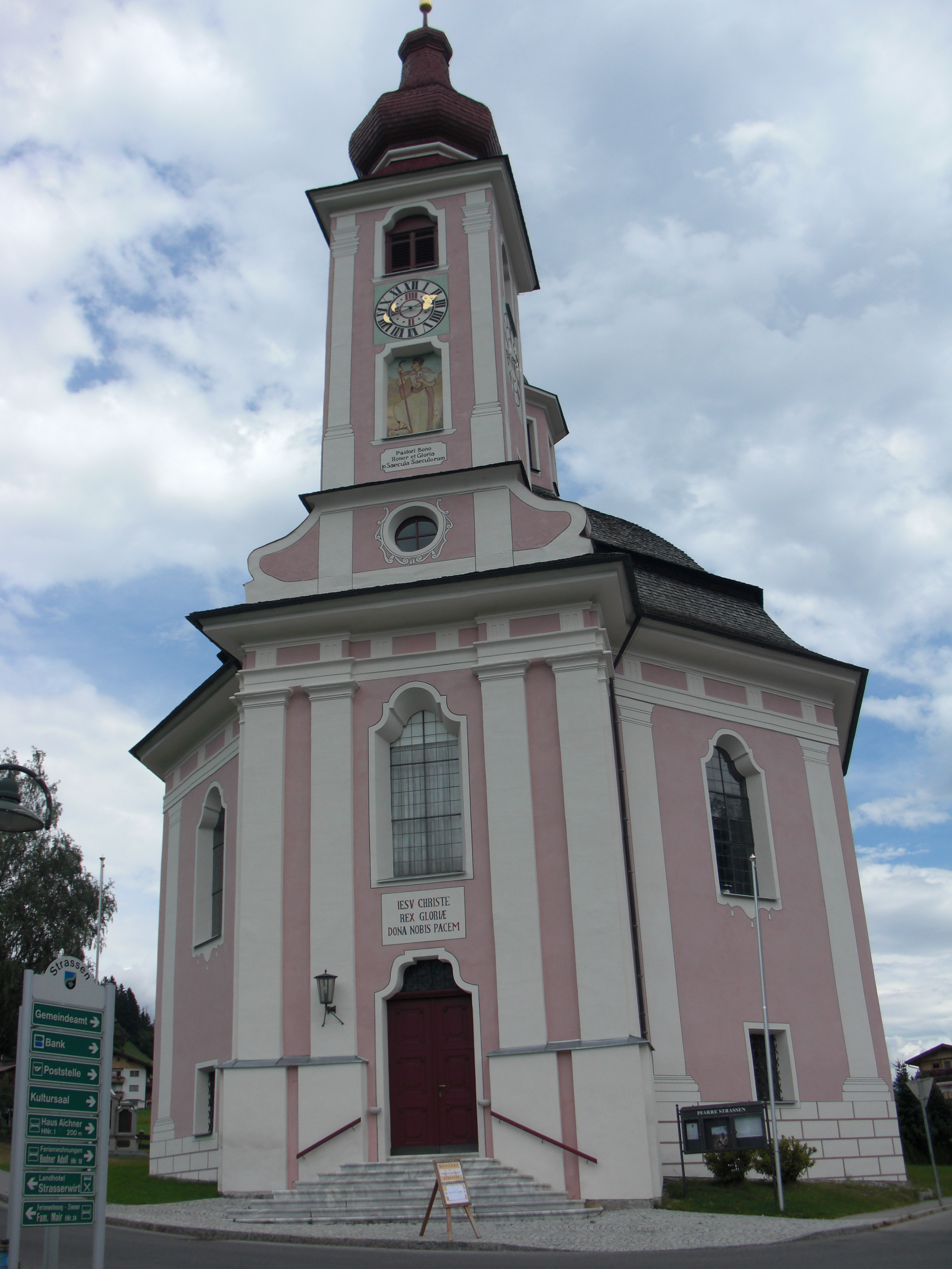 Kath. Filialkirche zur Hl. Dreifaltigkeit